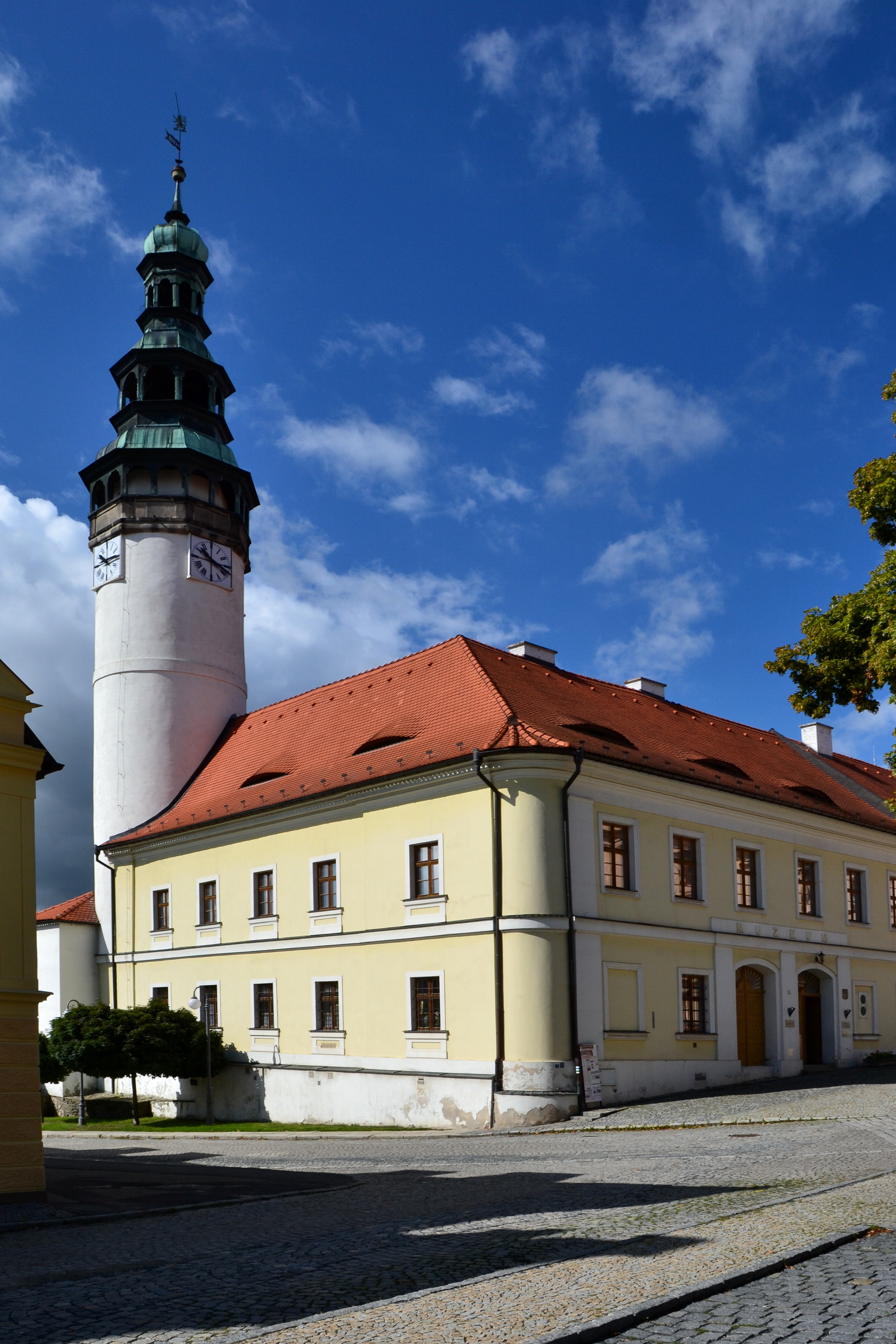 Chodský hrad, Chodské náměstí 96, Domažlice-Město, Domažlice.